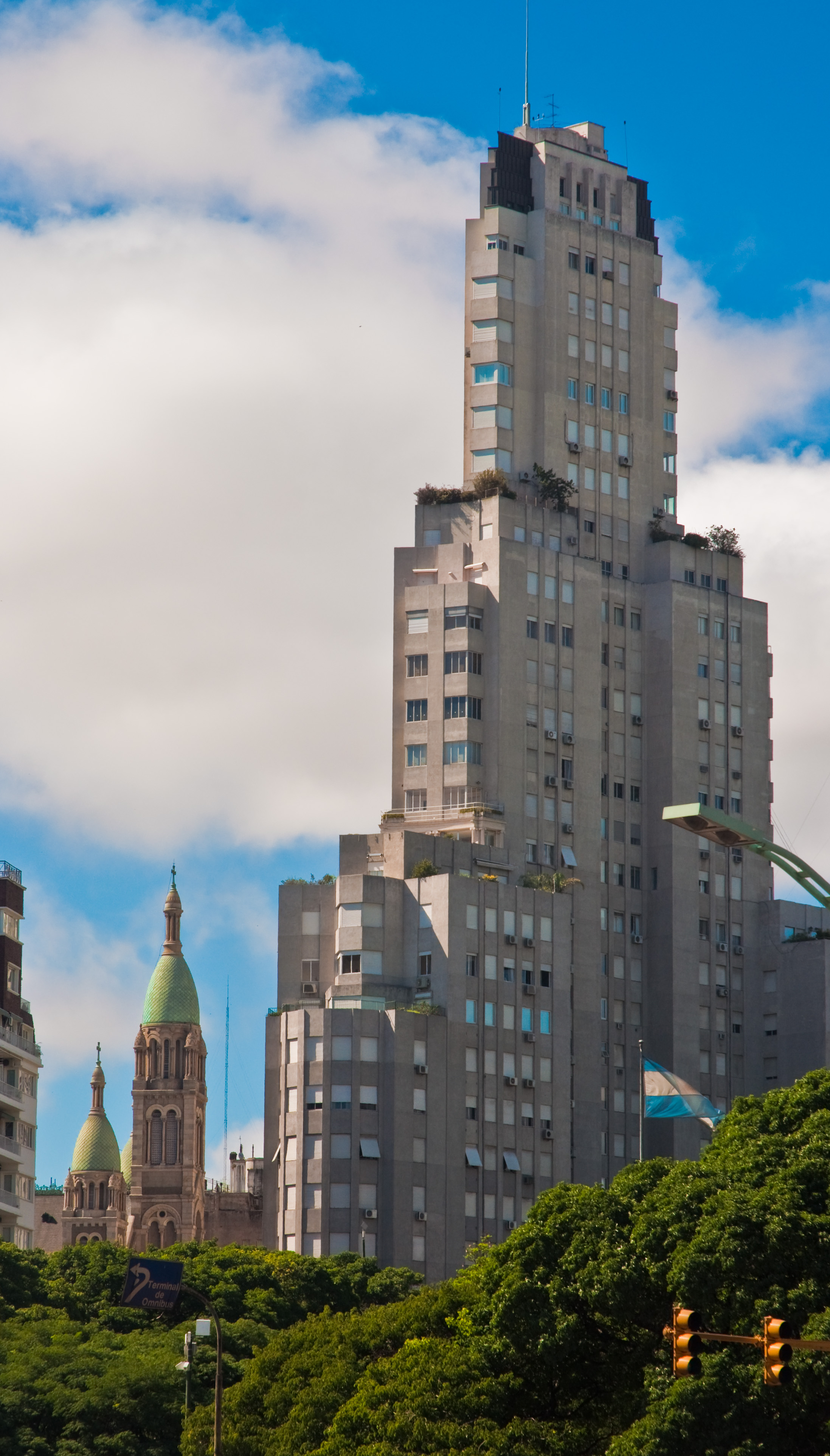 Edificio Kavanagh, Buenos Aires, Argentina, 31st. Dec. 2010